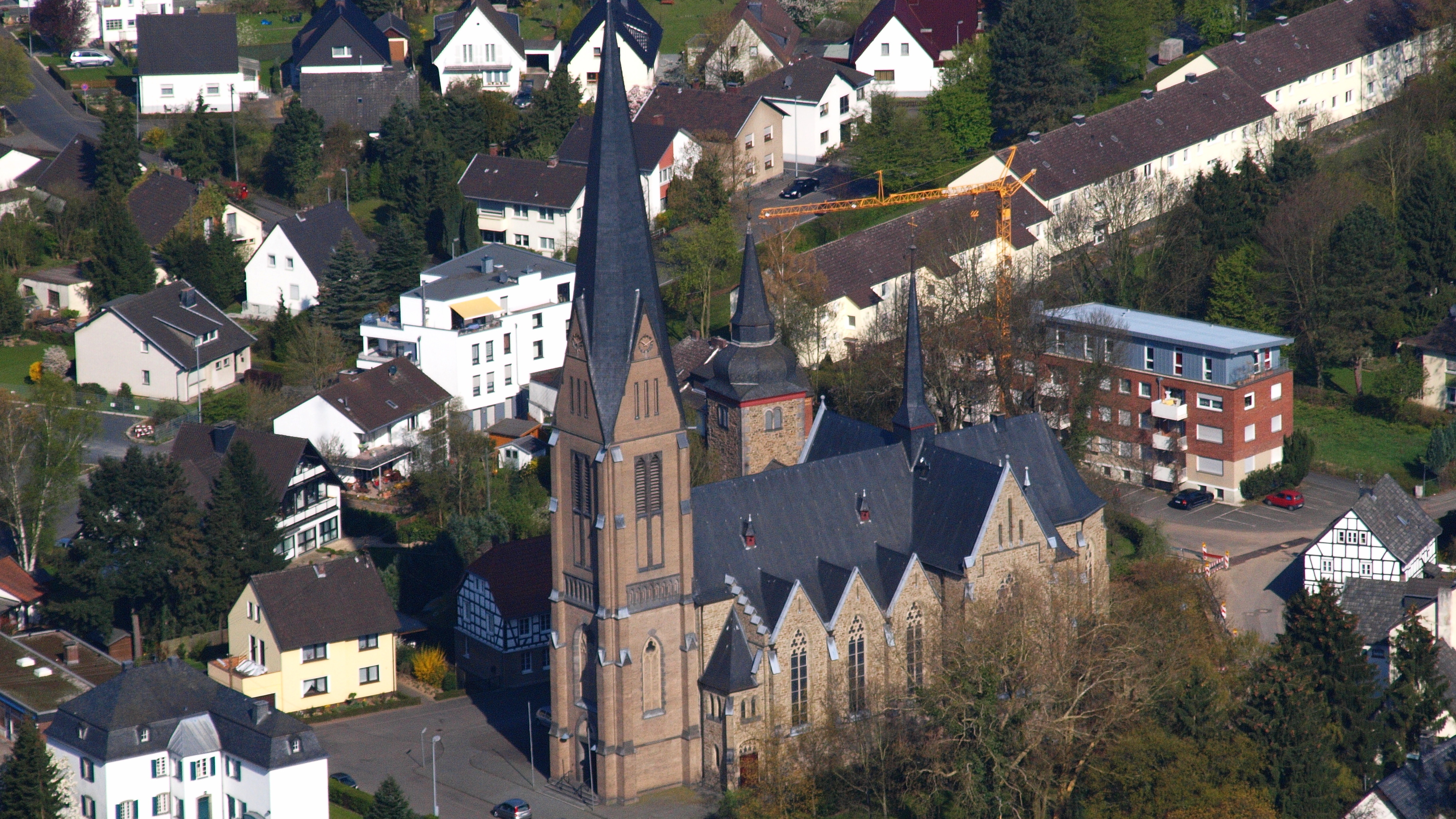 Sankt Simon und Judas (Hennef)